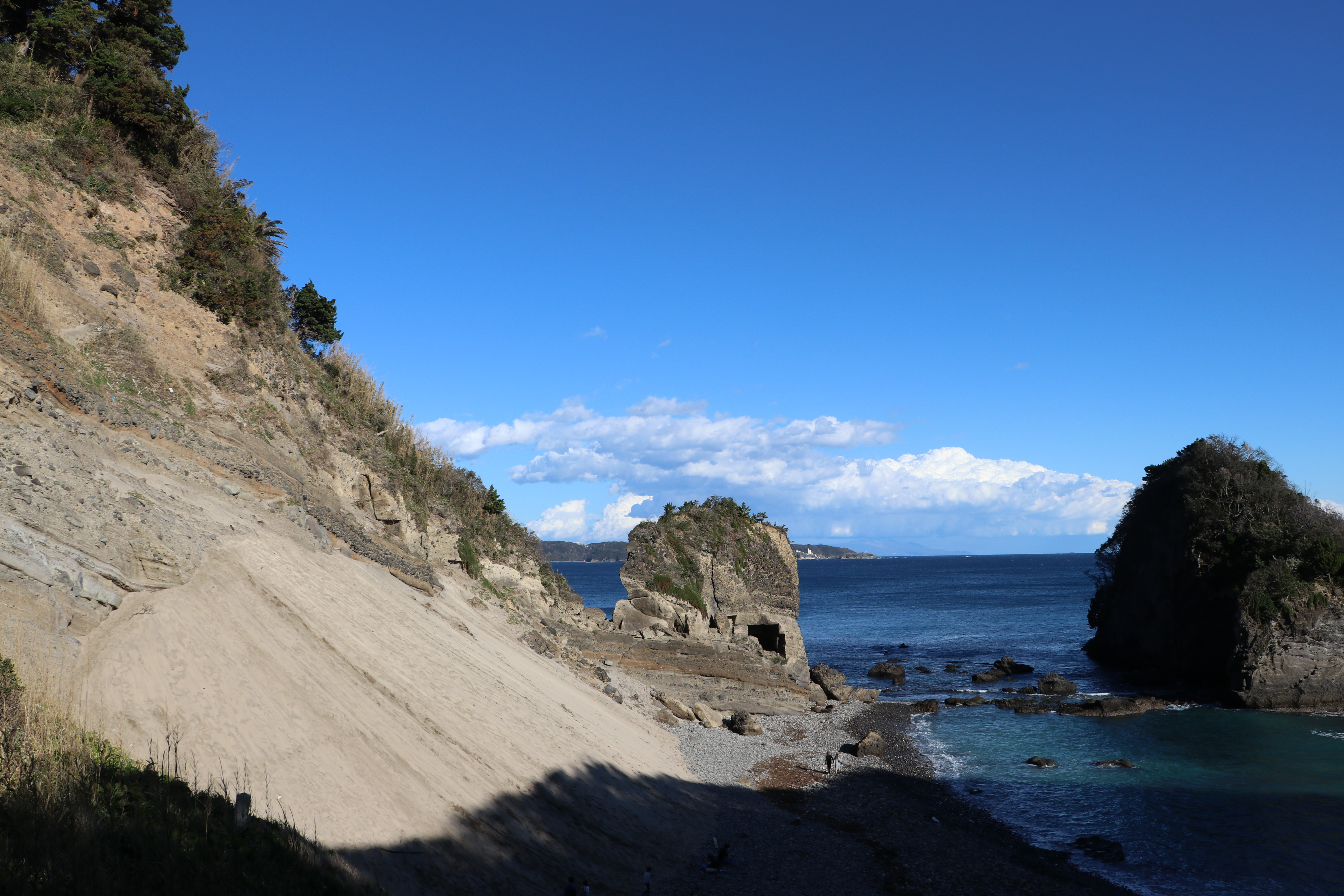 田牛サンドスキー場の全景。類似画像として龍宮窟周縁路から撮影したFile:Touji sandbank from periphery of Ryugu-Kutsu.jpgがある。